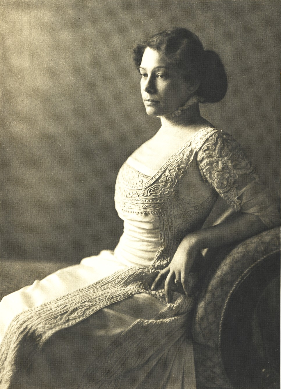 Portrait of Schauspielerin Tilla Durieux.